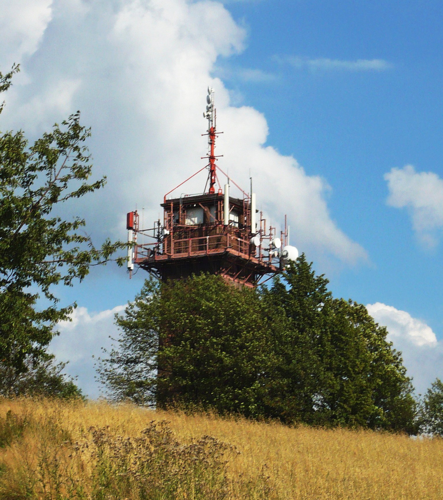 Nowa Ruda, wieża na Górze św. Anny